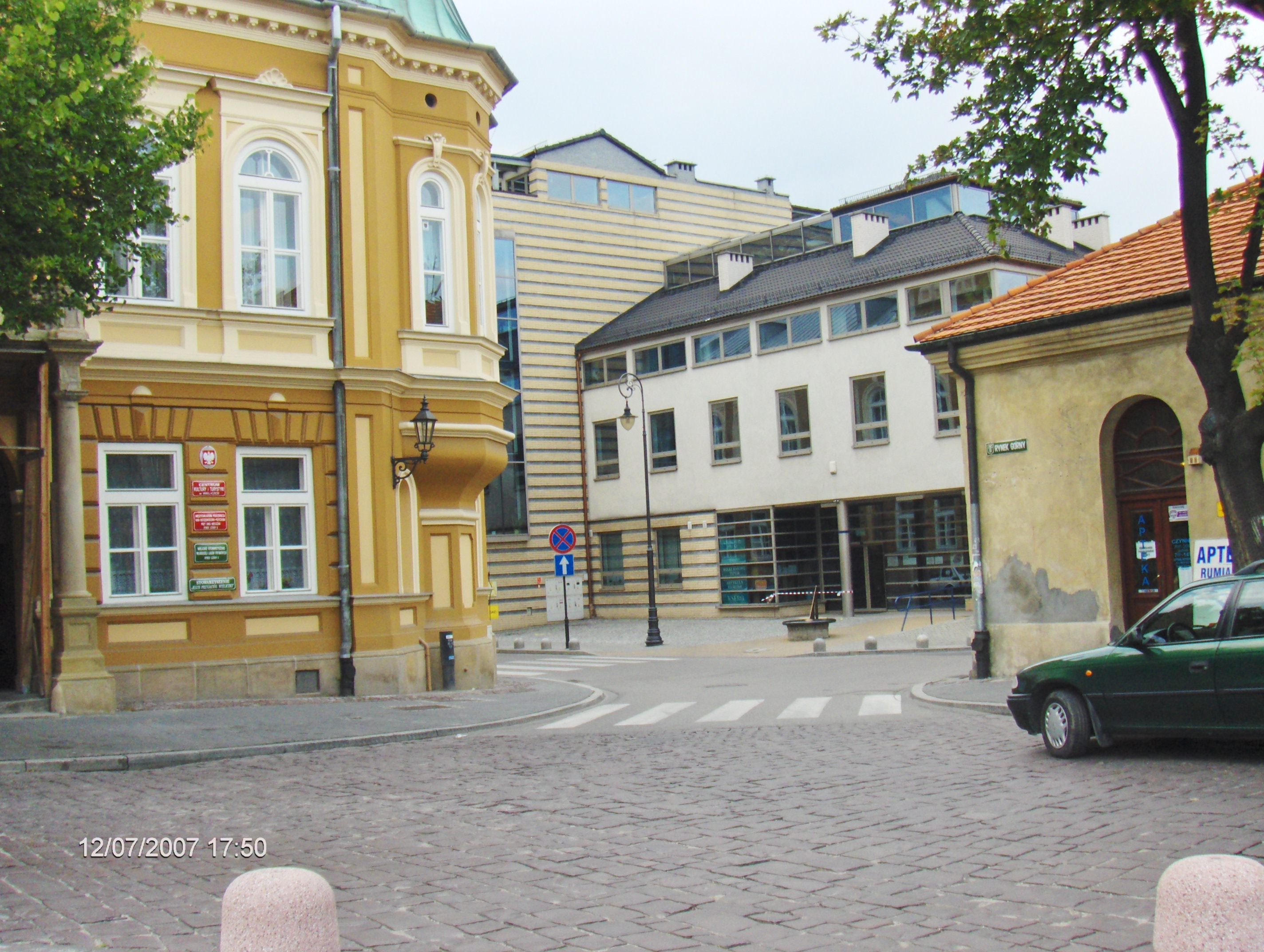 Urząd Skarbowy w Wieliczce